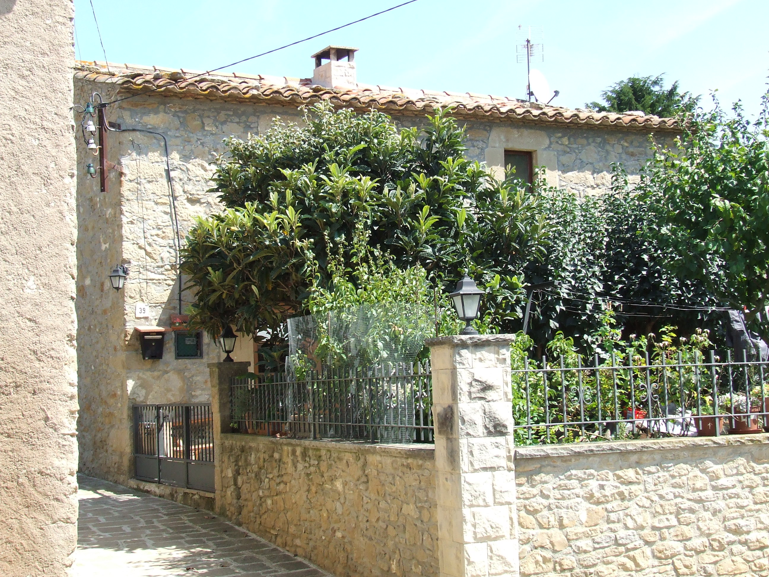 Cal Solanes (Castellcir, Moianès)